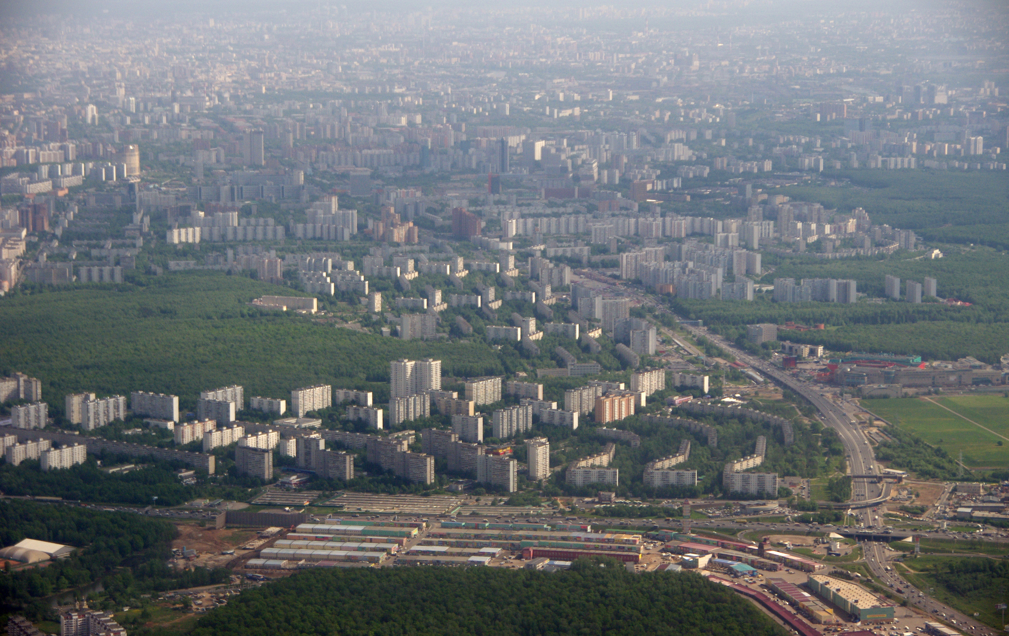 Photo from Vnukovo - Strigino ATR-72 plane